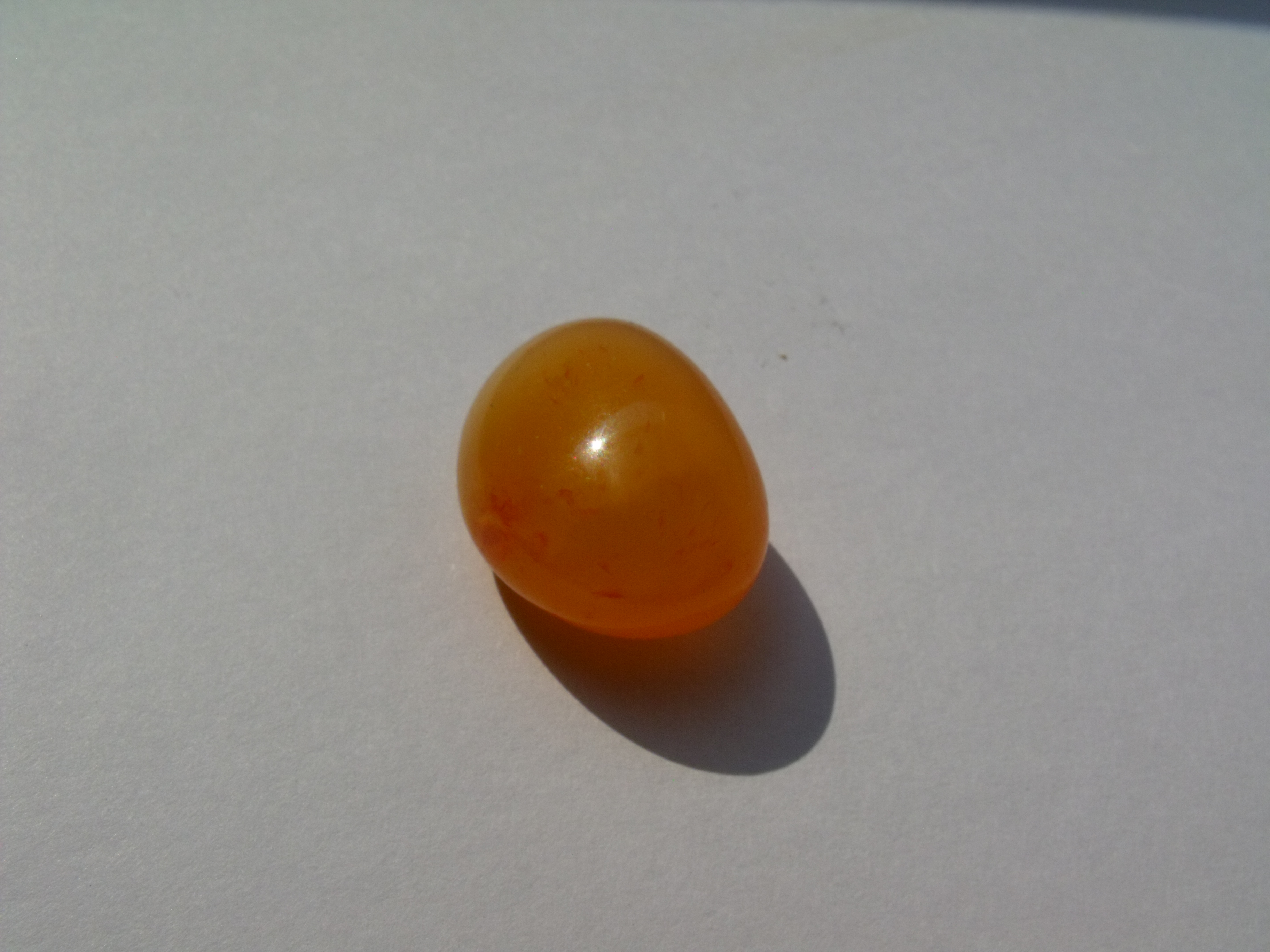 Orangener Aventurin Trommelstein